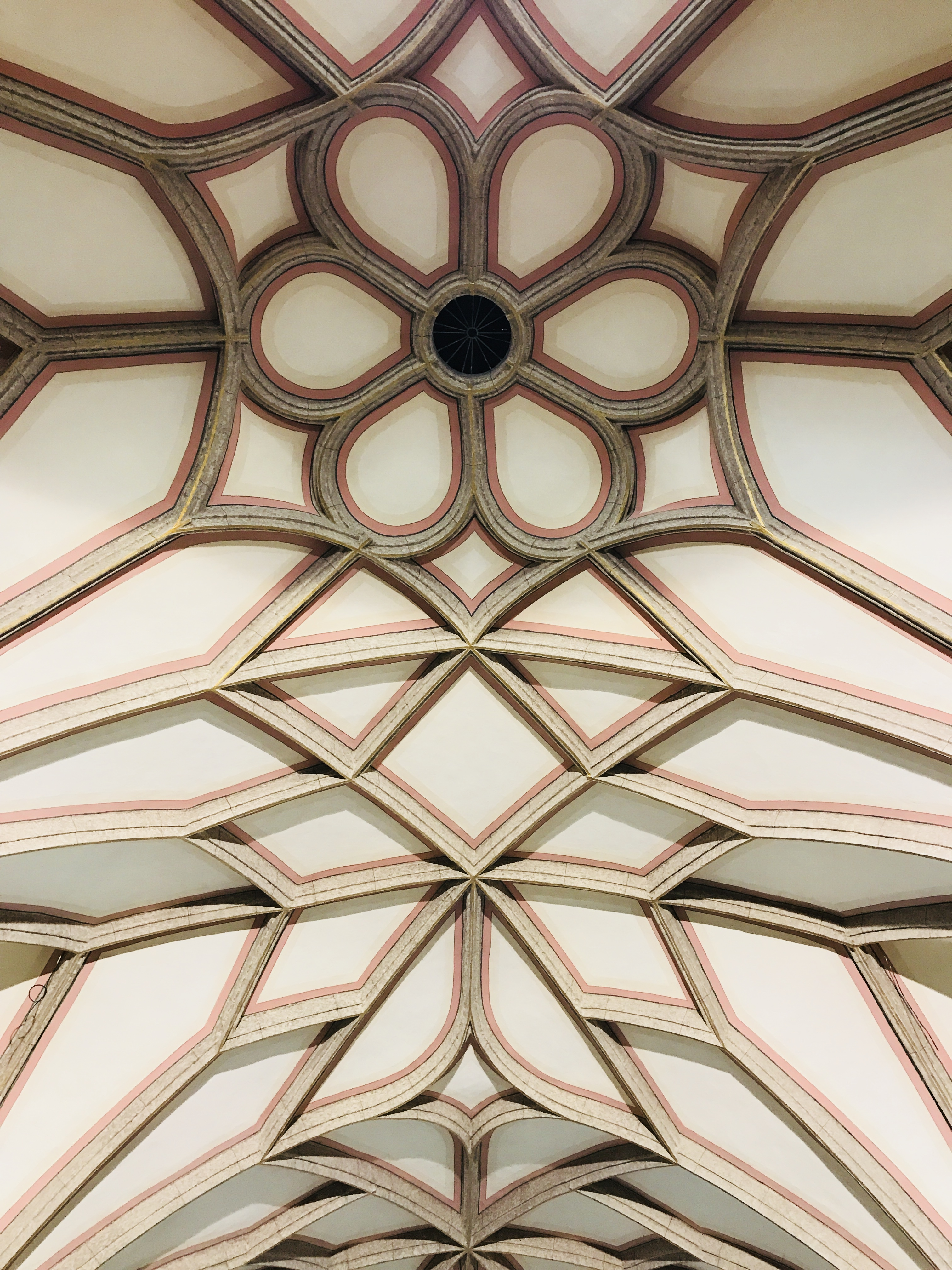 Pfarrkirche Bad Zell. Gotische Gewölberippen aus dem 15. Jahrhundert